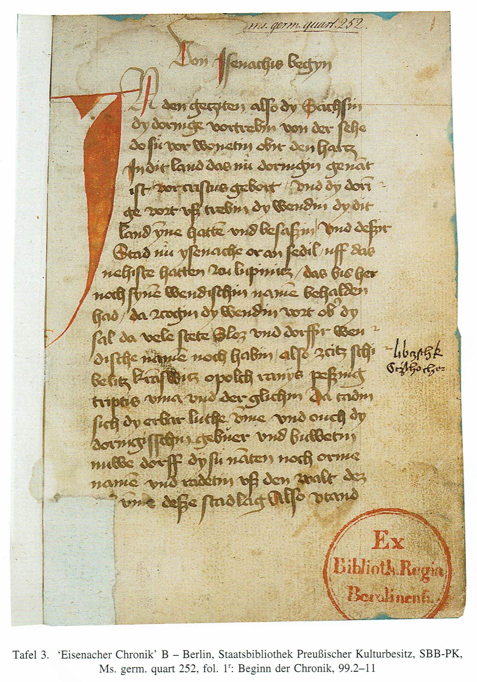 Beginn der Eisenacher Chronik Berlin SB mgq 252 Bl. 1r